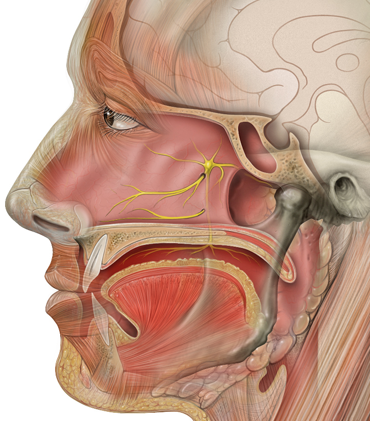 Head greater petrosal nerve